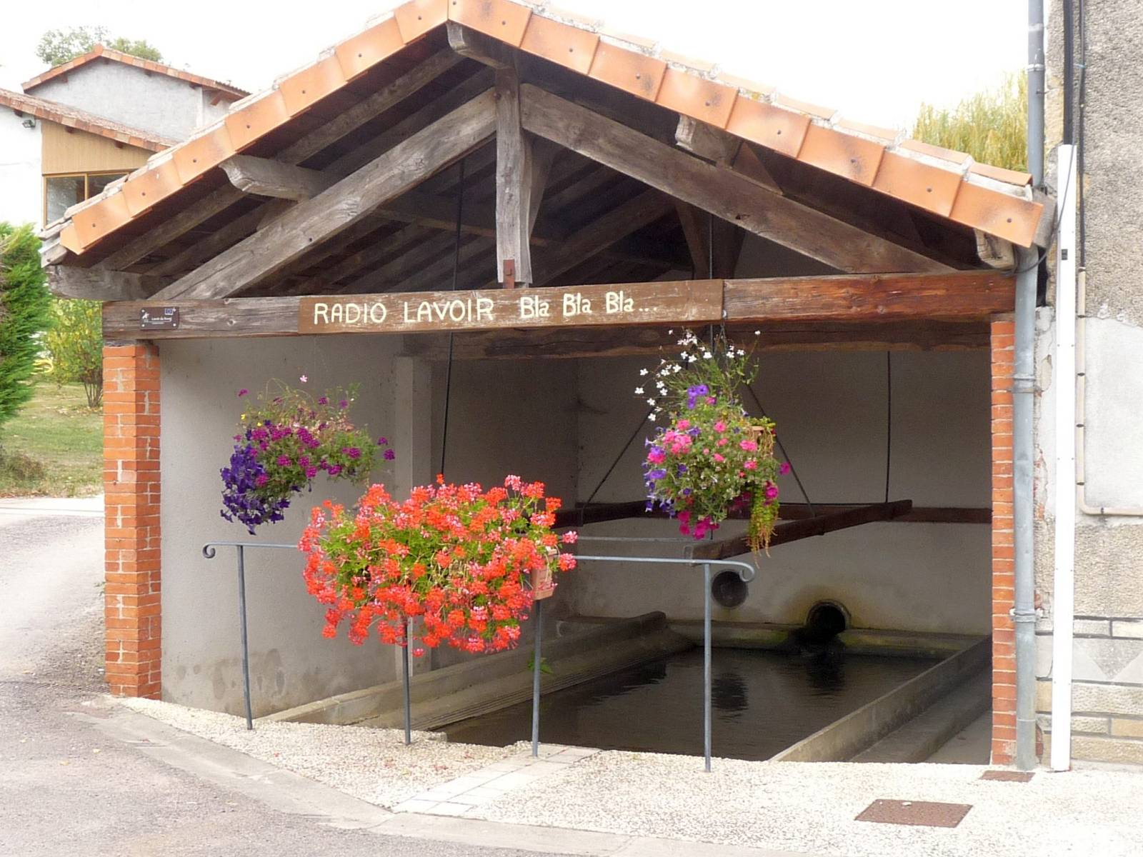 lavoir du bourg d'Alloue, Charente, France